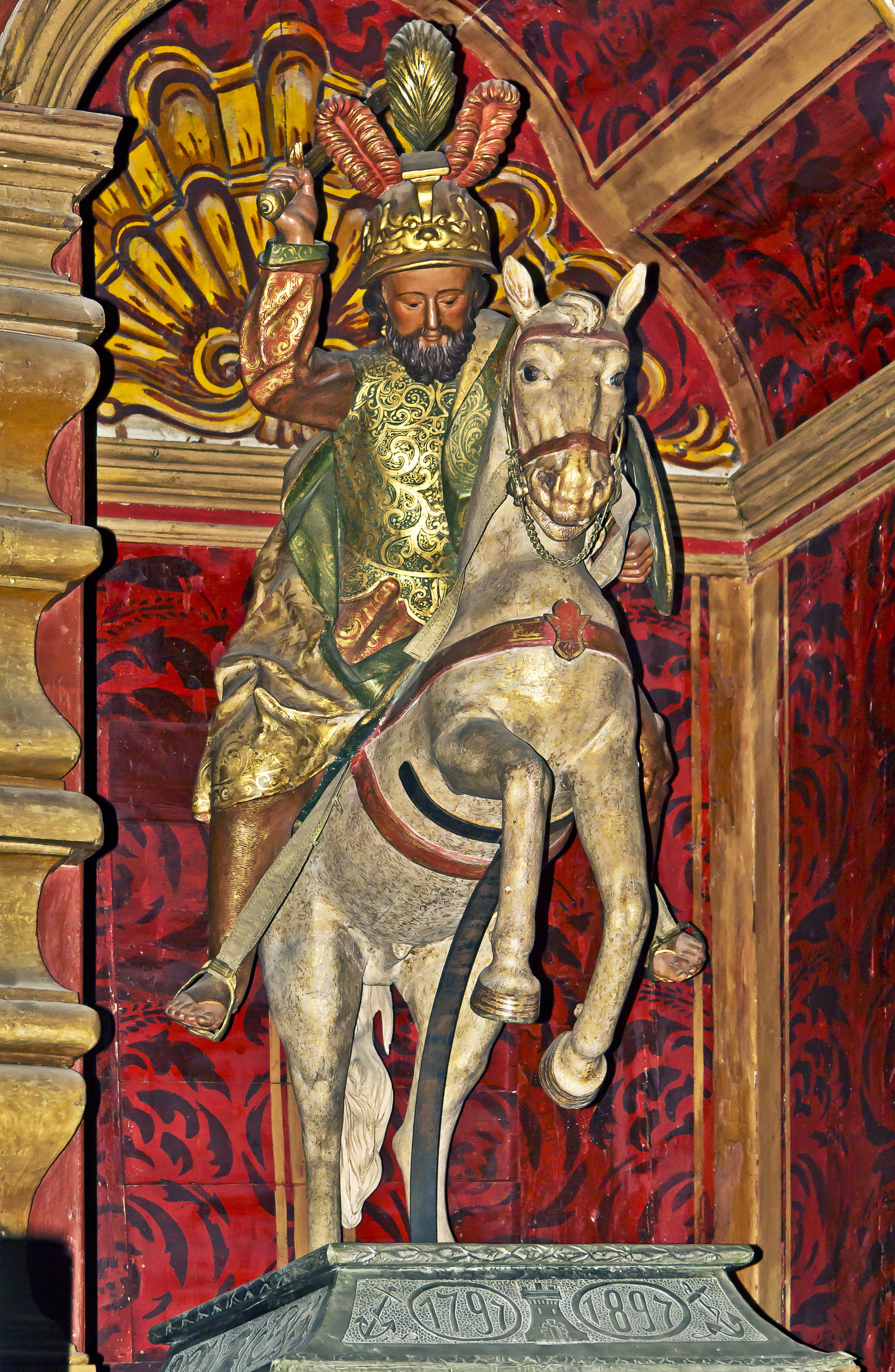 Die Figur des Santiago (Matamoros) in der gleichnamigen Kapelle der Kirche Nuestra Señora de la Concepción in Santa Cruz de Tenerife.